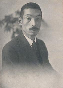 Kawakami Hajime（河上肇）,Japanese Marxist economist